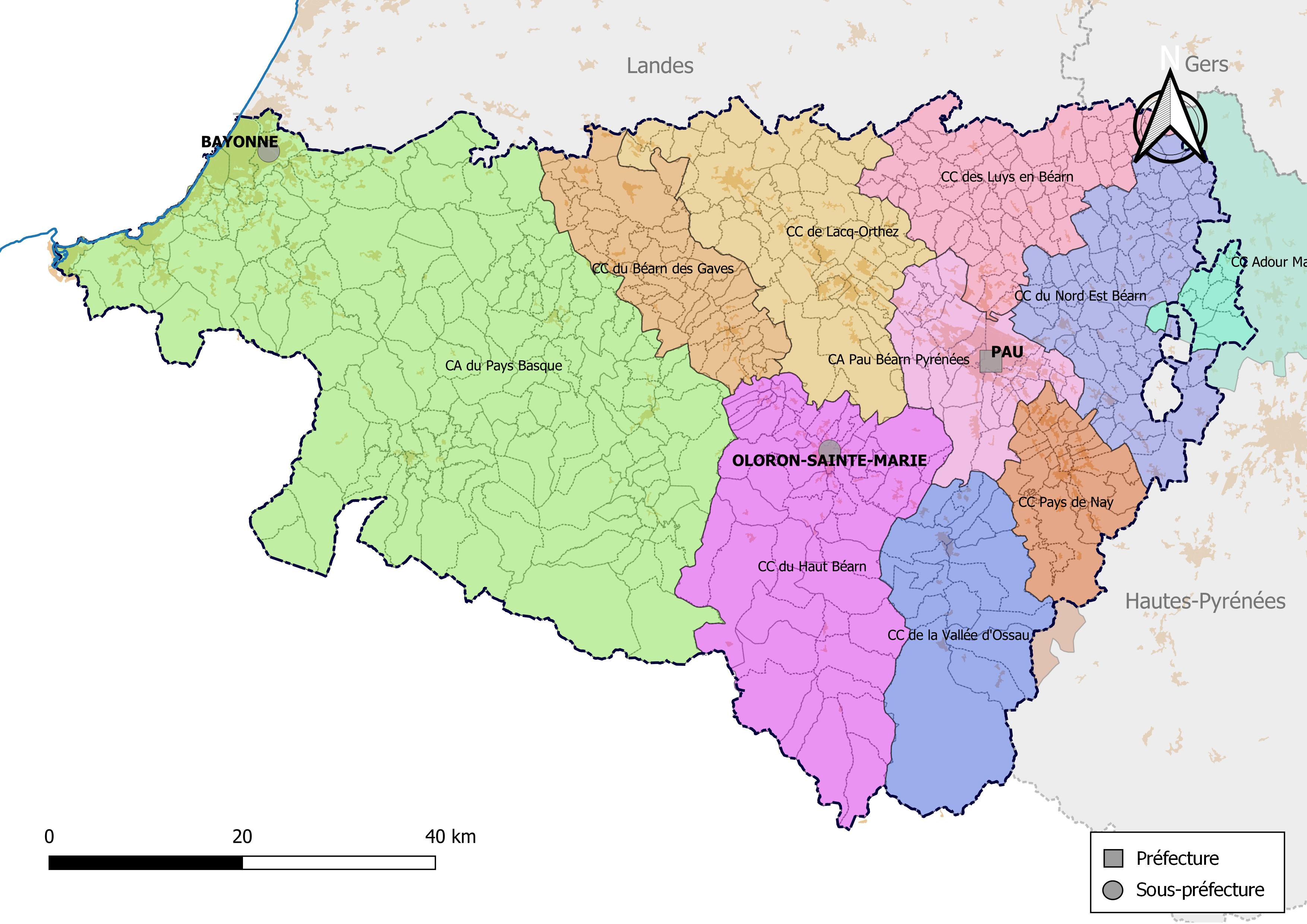 Carte des intercommunalités du département des Pyrénées-Atlantiques, France. Composition au 1er janvier 2019.